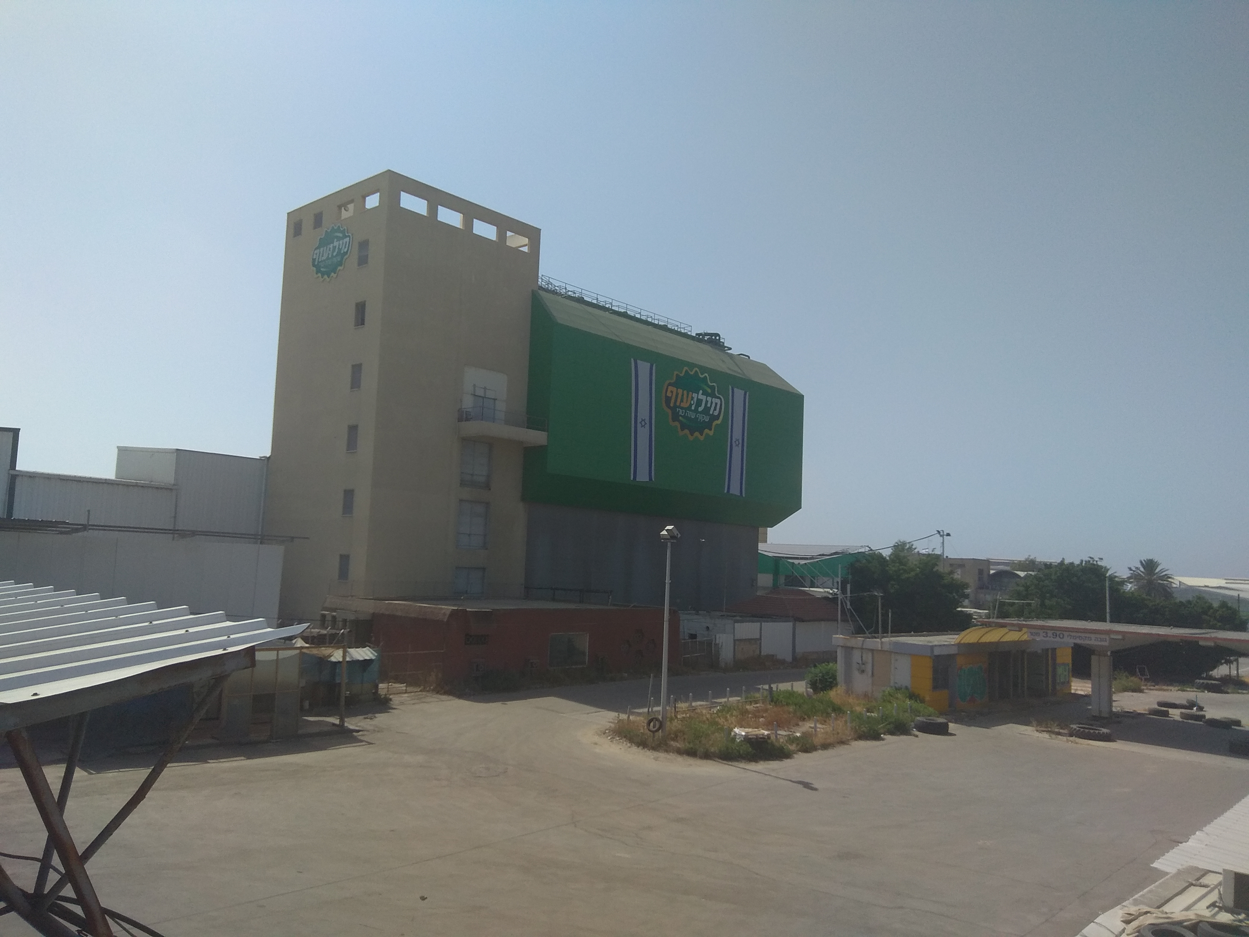 מפעל מילועוף